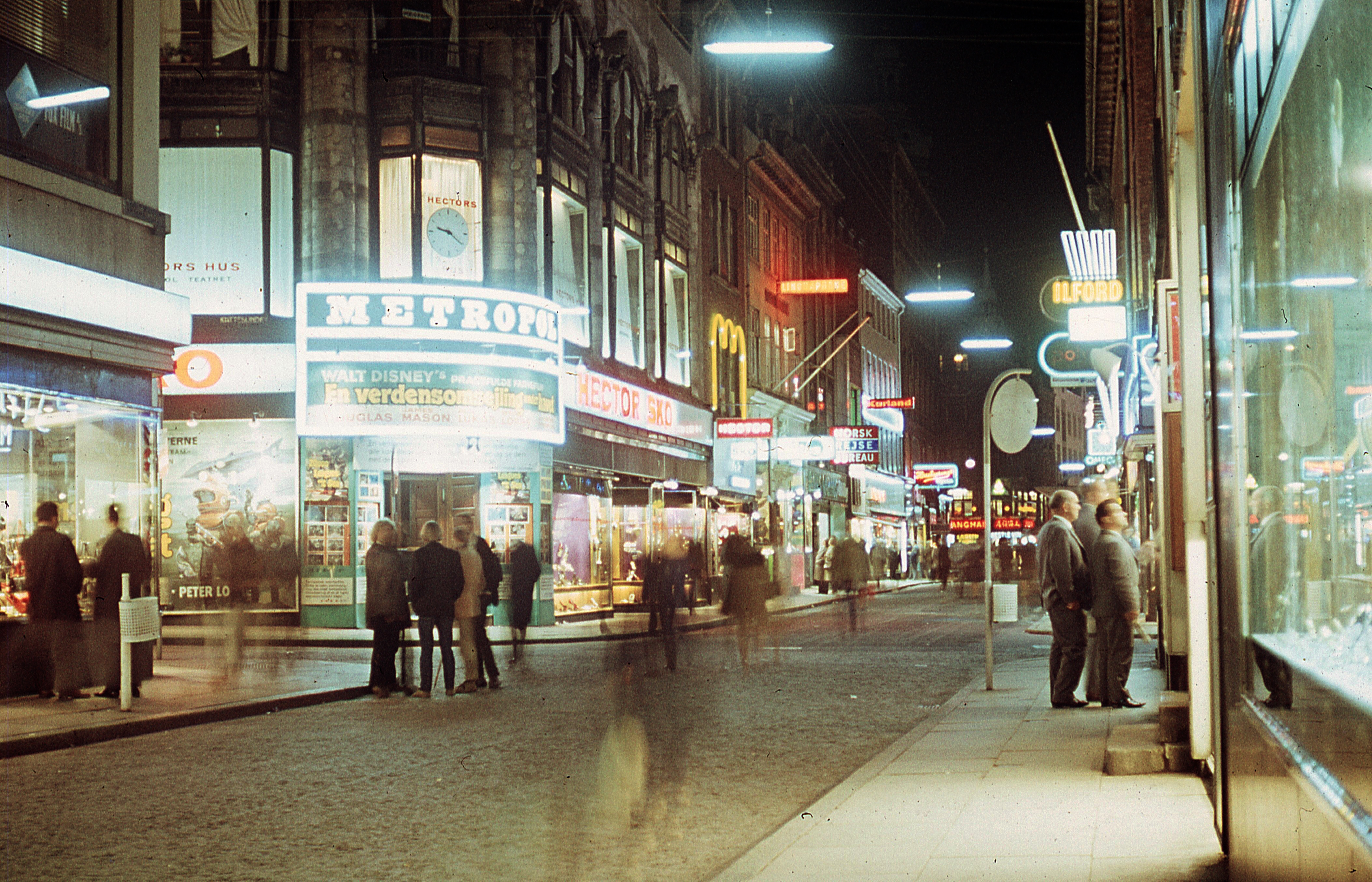 Frederiksberggade - Kattesundet kereszteződése. Location: Denmark, Copenhagen Tags: neon sign, colorful, street view Title: Frederiksberggade - Kattesundet kereszteződése.